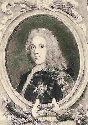 Jean-Fréderic Phélypeaux comte de Maurepas (1701-1781) french politician